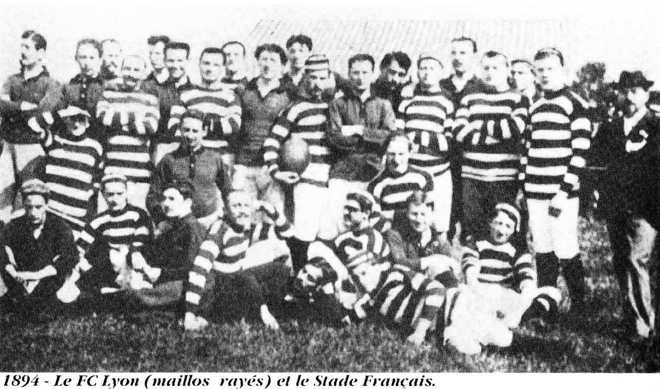 Photo de groupe rugby à XV - Football Club de Lyon (FCL) - Stade français - 8 juin 1894.